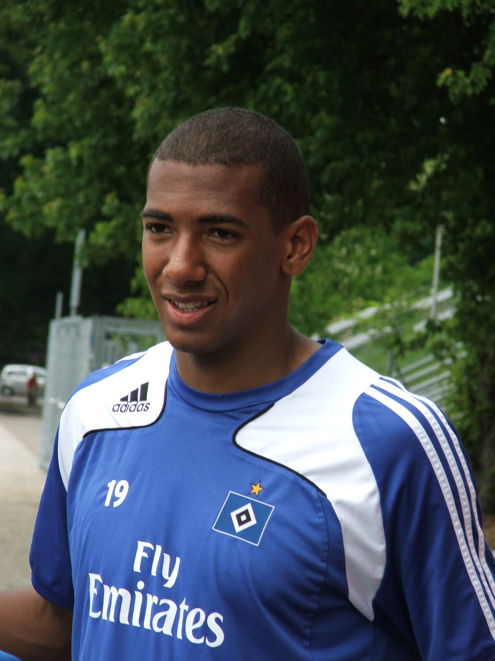 Jerome Boateng nach dem HSV-Training